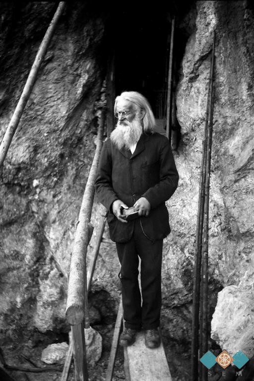 Puščavnik pred svojim bivališčem.